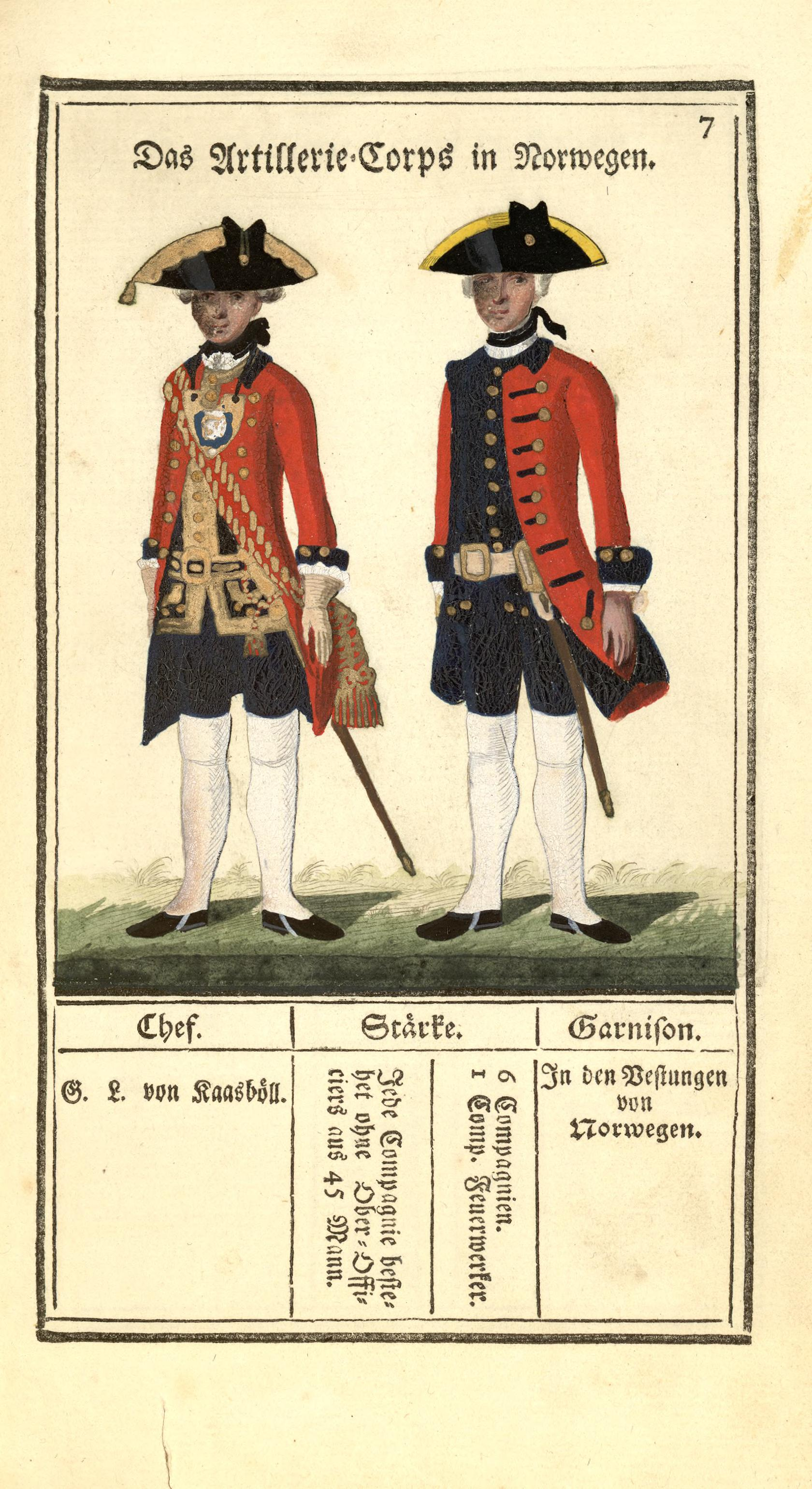 Illustrasjon hentet fra boken "Vorstellung der sämtlichen Königl. Dänischen Armee" av Bertram, Carl og utgitt av Carl Bertram (dk, 1763)